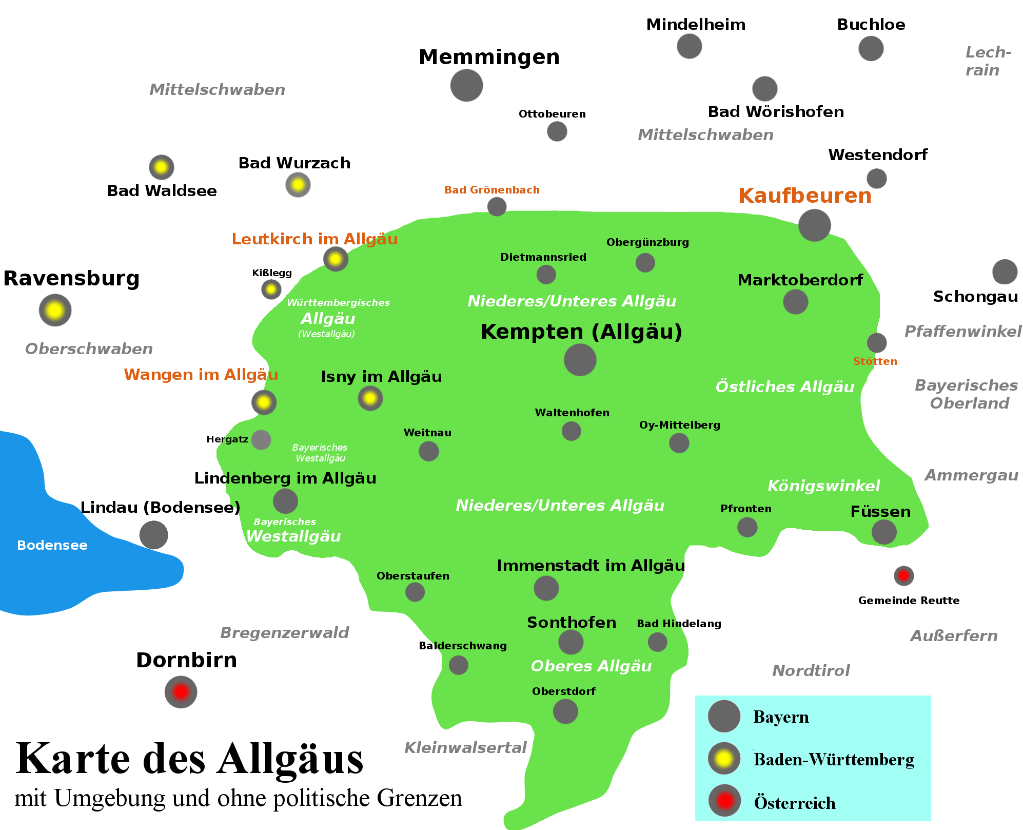 Lageplan/Karte des Allgäus anhand Ulrich Crämer/Philip Jakob Karrer/Otto Merkt (19. Jahrhundert/20. Jahrhundert). Der Ort Buchloe nennt sich erst in jüngerer Zeit (2000er) Tor zum Allgäu. Davor nannte sich Kaufbeuren lange Zeit Tor zum Allgäu.